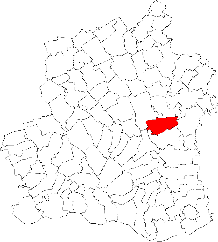 Categorie:Hărţi ale judeţului Teleorman